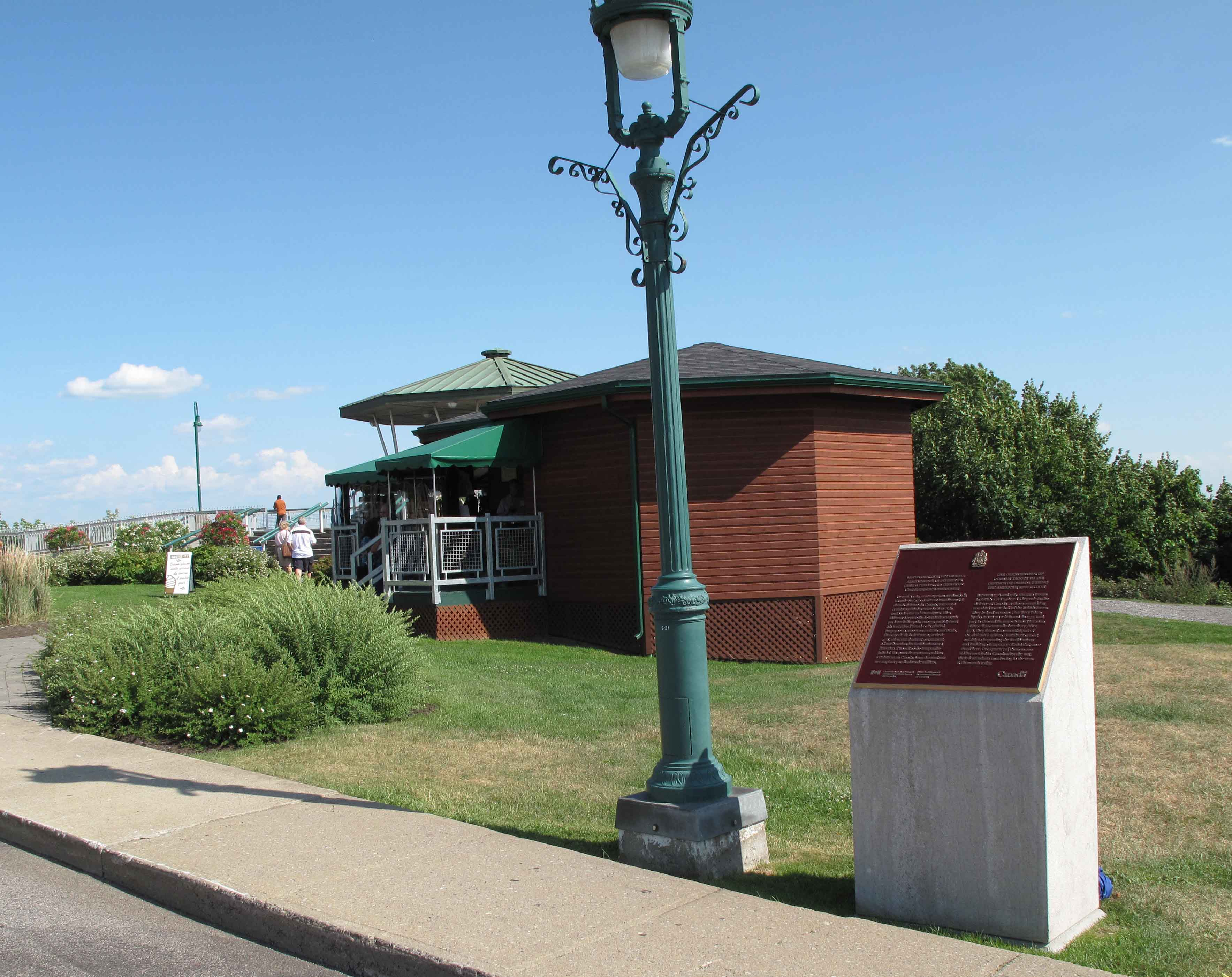 Plaque érigée sur les Plaines d'Abraham à Québec afin de souligner la contribution des mercenaires allemands à la défense du Canada lors de la Révolution américaine (1775-1783).